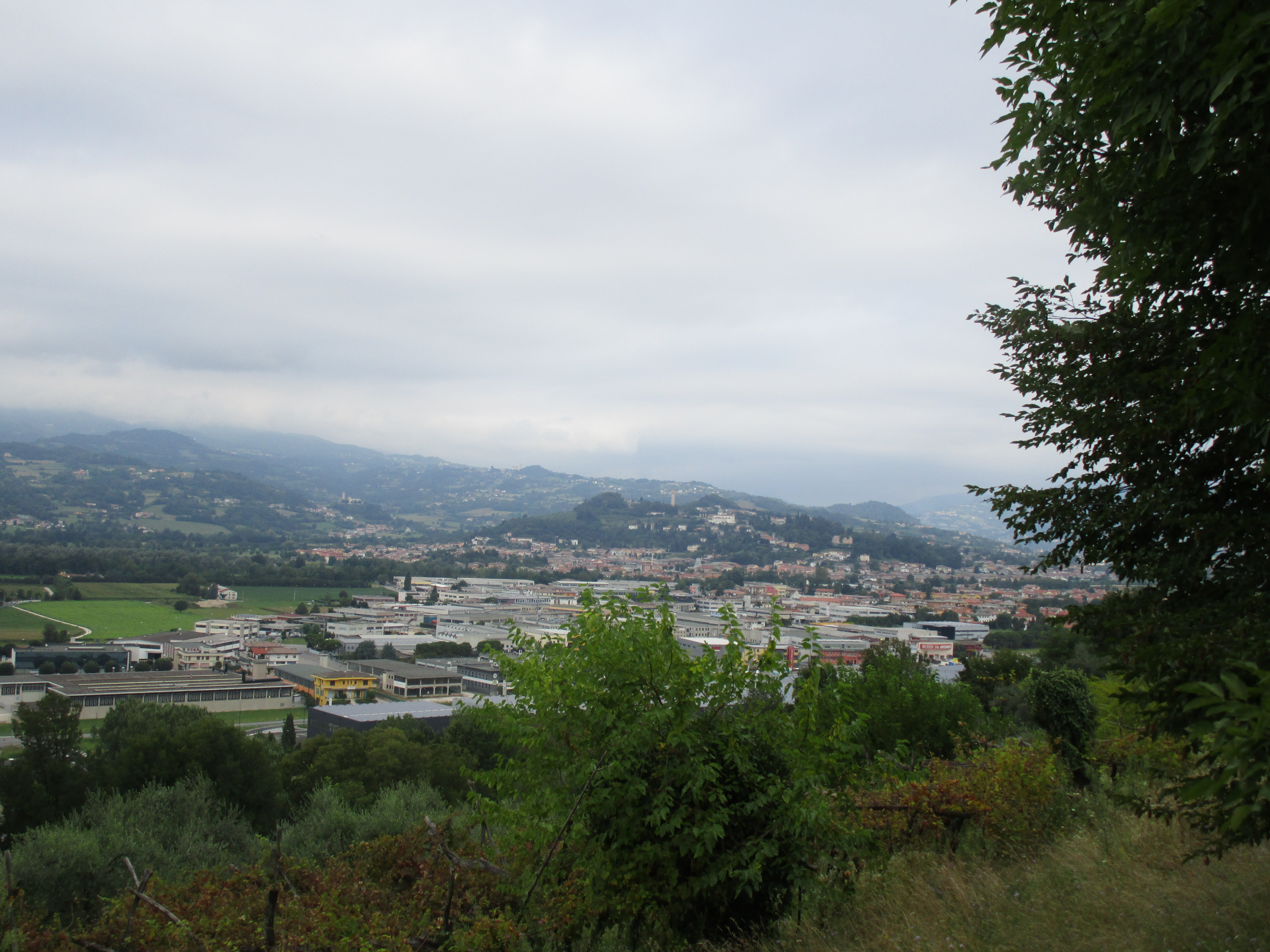 Veduta di Trissino da Via Pianeta.